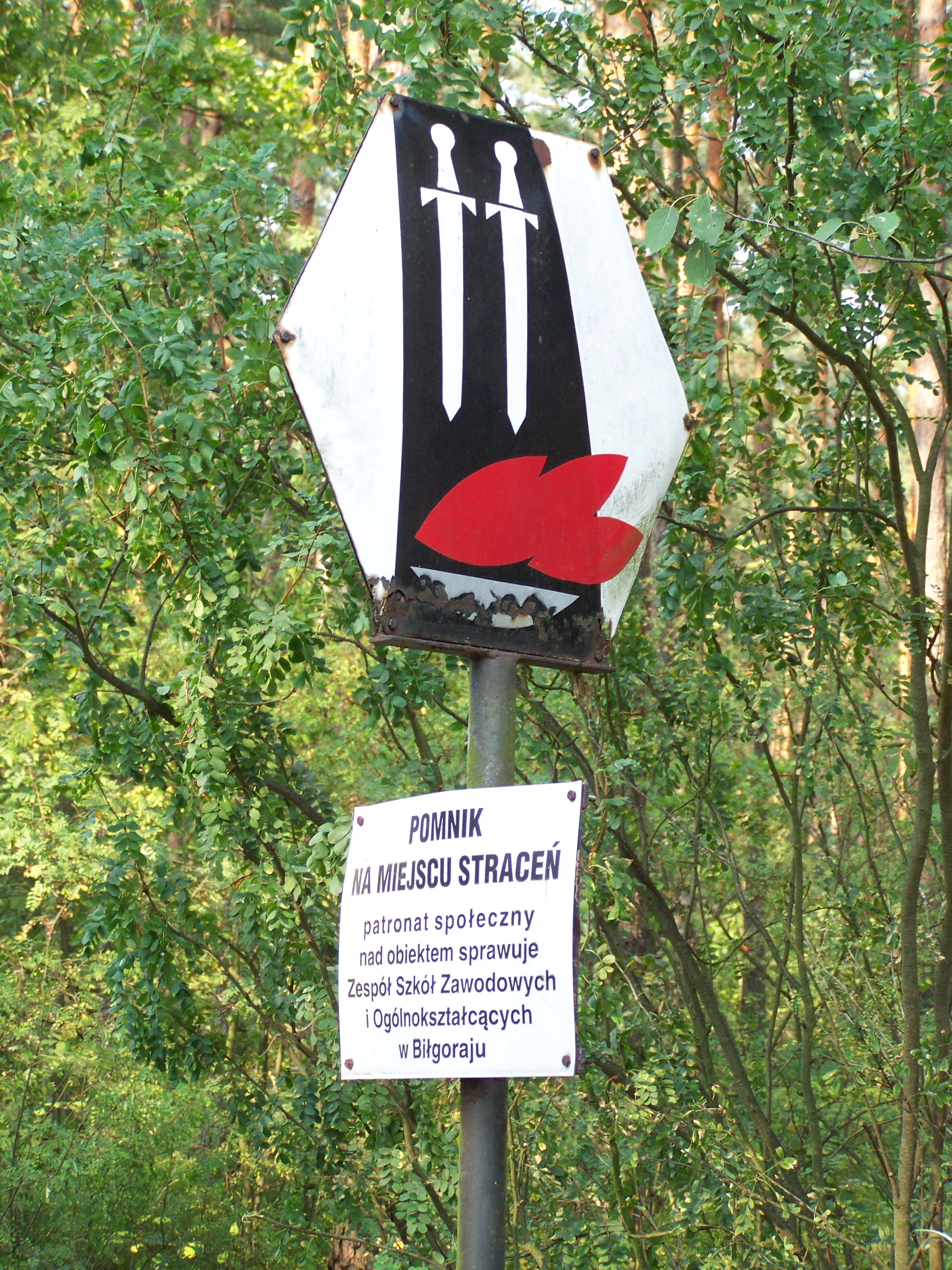 Miejsce egzekucji partyzantów, jeńców bitwy pod Osuchami, zamordowanych na Rapach przez hitlerowców w 1944 roku.